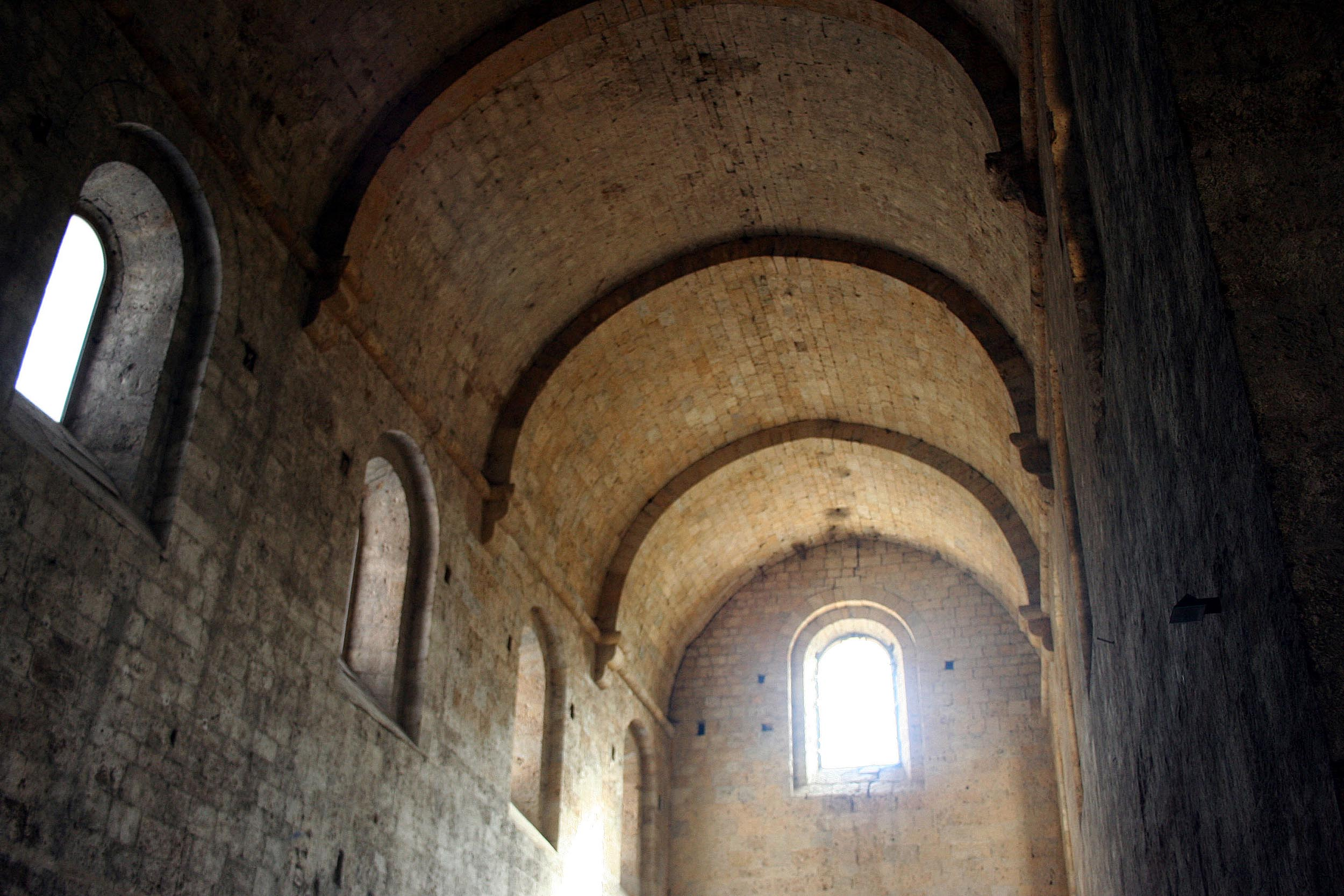 Abbaye de Boscodon, voûte de la nef de l'église